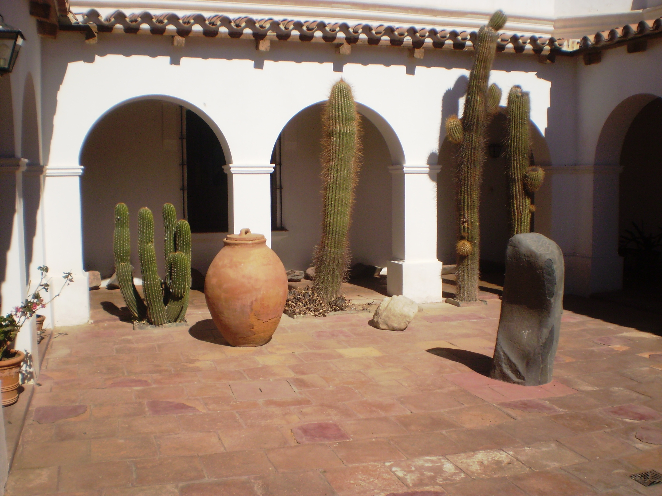 .Museo Arquelógico Don Pío Pablo Díaz de la ciudad de Cachi (Salta),Argentina.